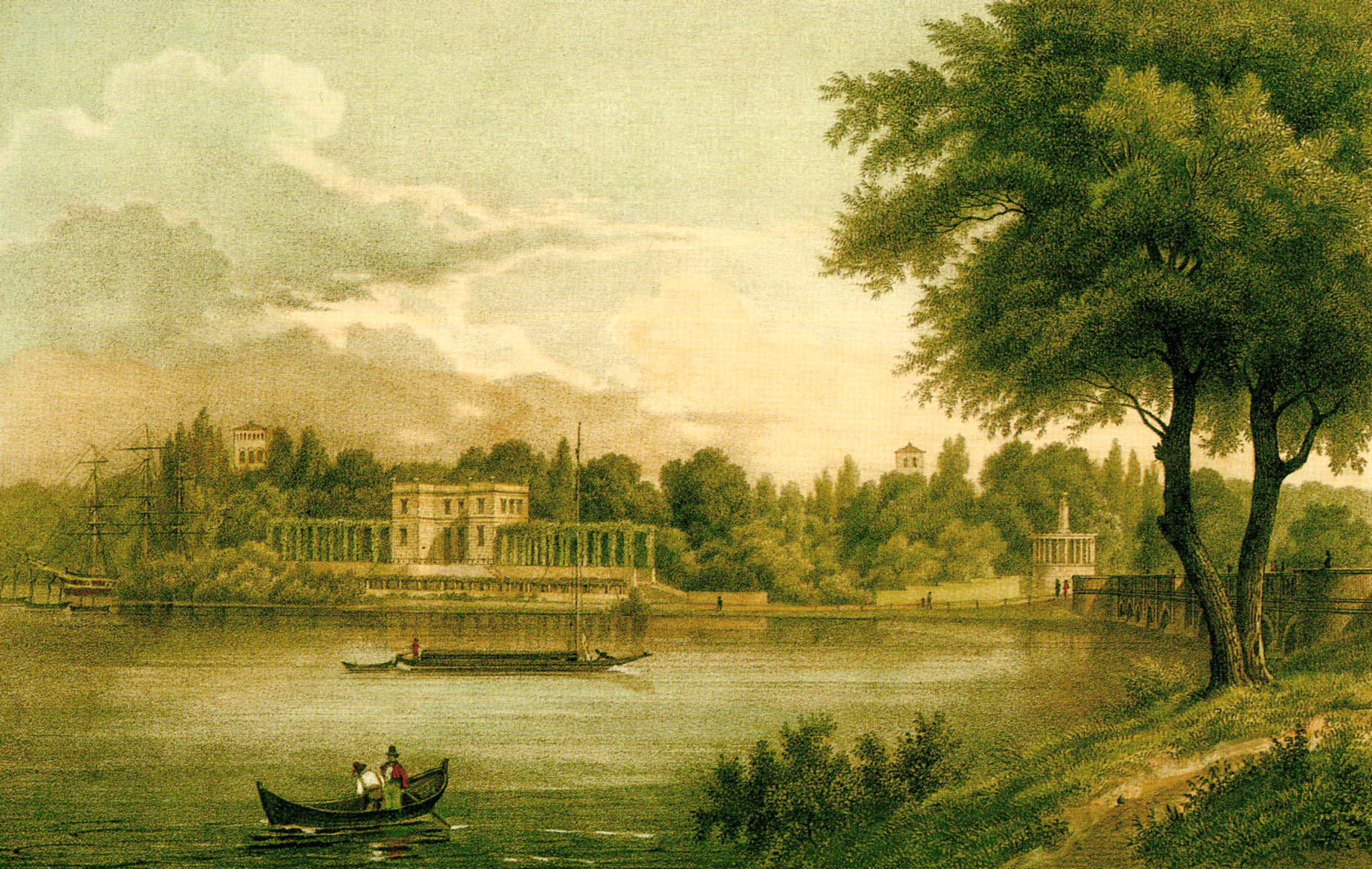 Peter Lütke Das Glienicker Ufer um 1840